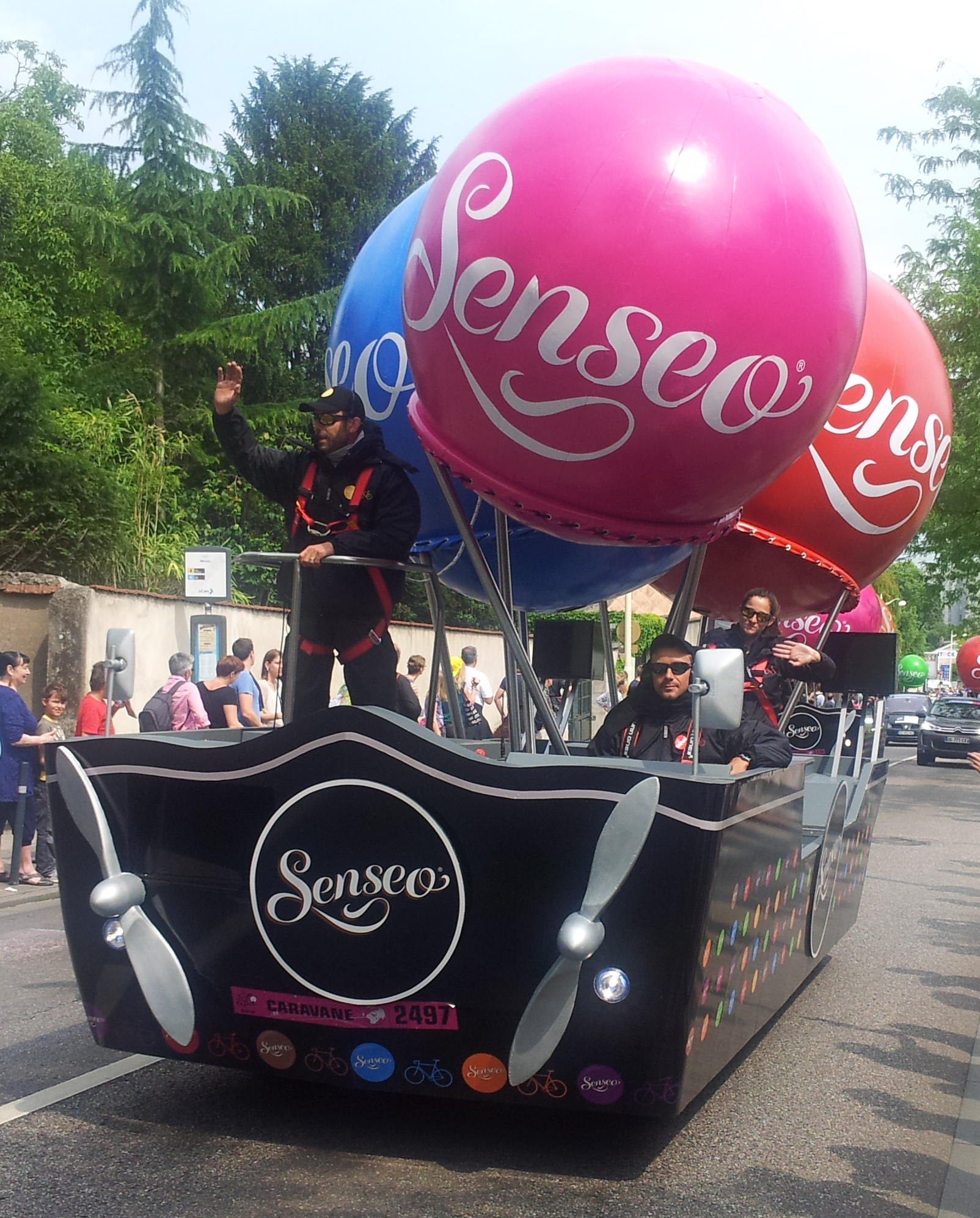 Véhicule de la caravane du Tour de France 2014 dans la côte de Boufflers à Nancy (7e étape).